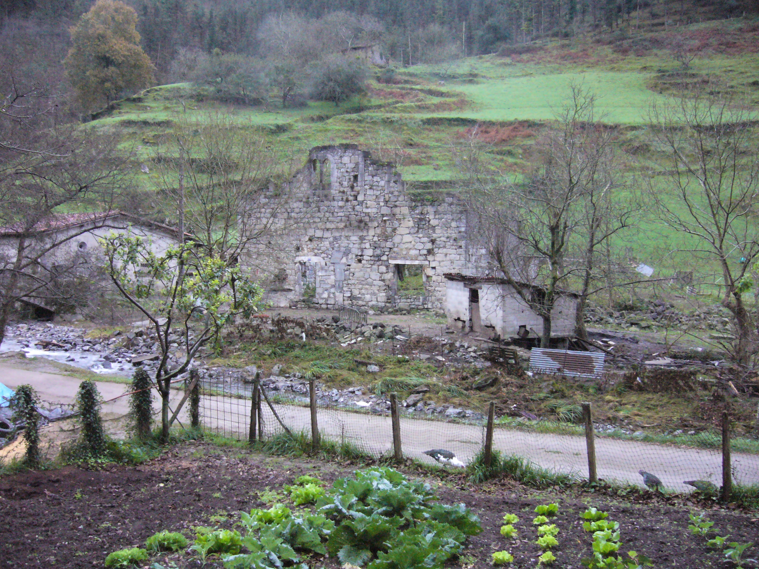 Altzolaras jauregia